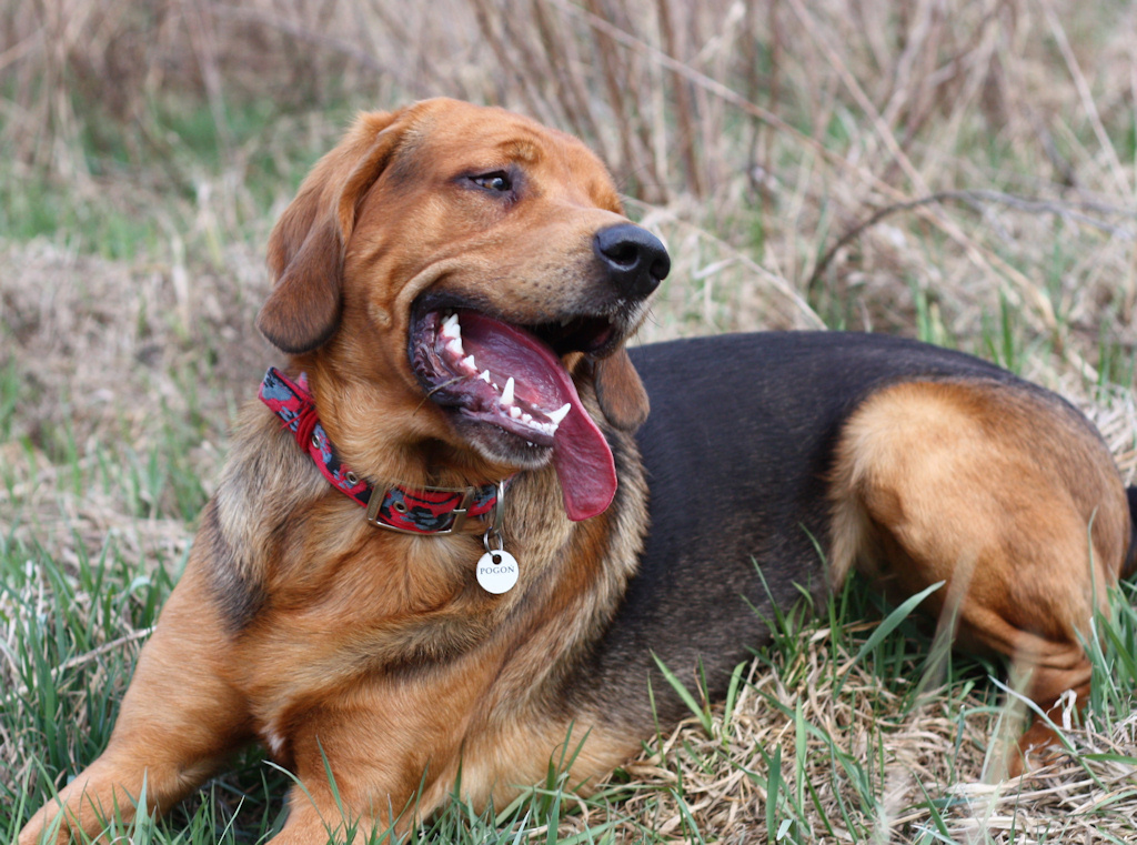 Pogoń ze Stadniny Cisowiec, wł. Dorota Kruzińska, rasa: Ogar Polski